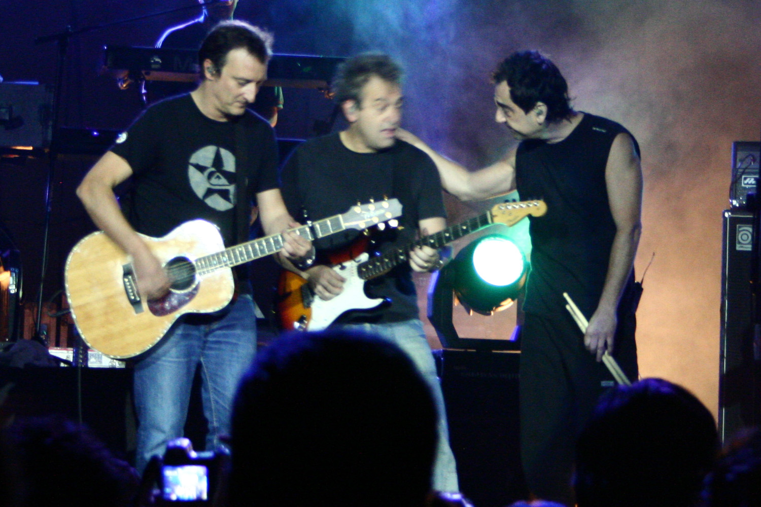 Hombres G es una de las bandas españolas de rock/pop con mayor trascendencia desde su aparición a principios de los años ochenta hasta la actualidad, dadas sus cifras de ventas y la dimensión de su éxito, que abarca tanto España como América además de algunos puntos en Portugal.